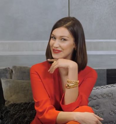 마리끌레르의 스물 다섯번째 생일을 축하하는 모델 벨라 하디드